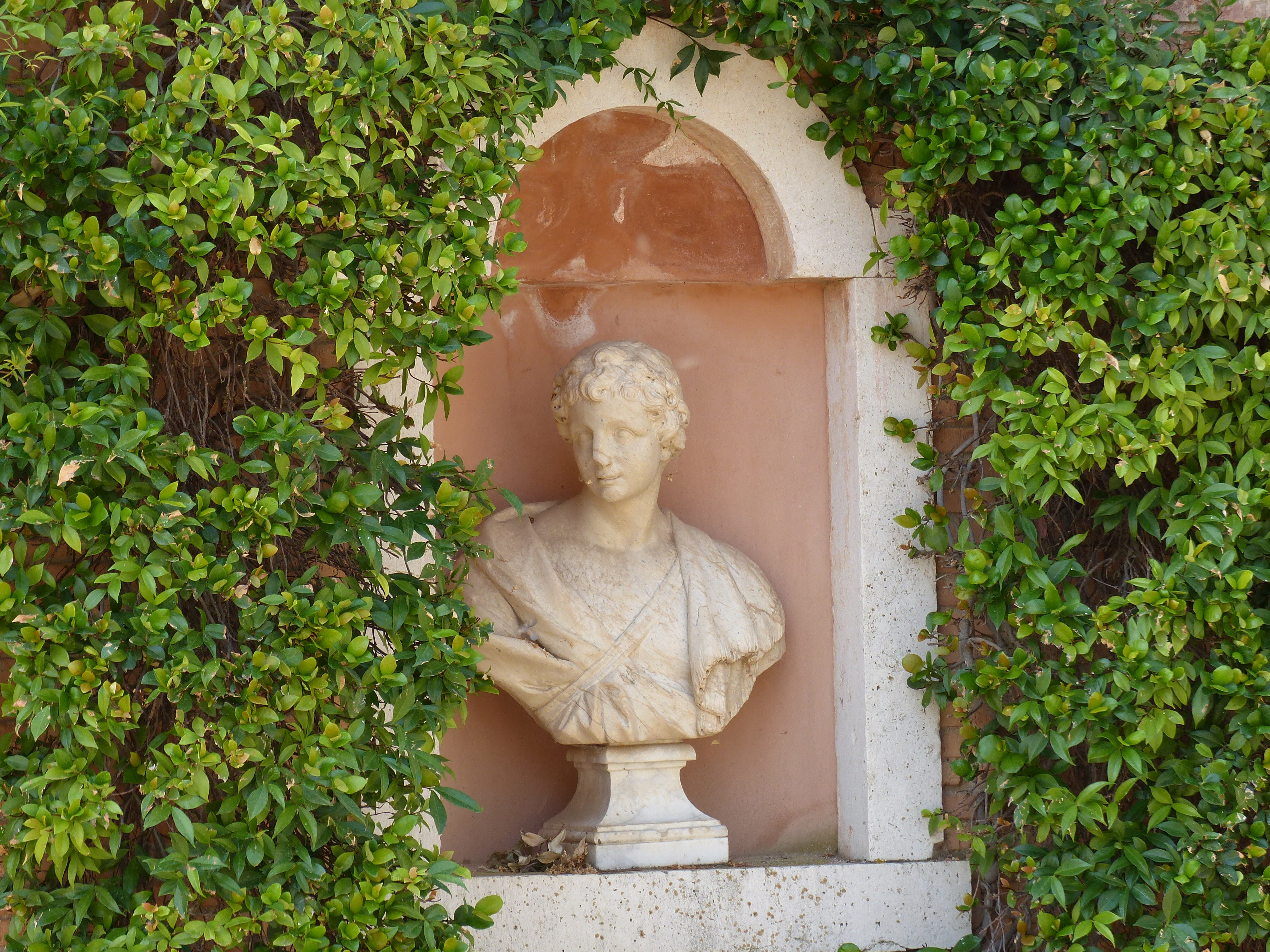 Exterior del Palacio de Aranjuez, detalles